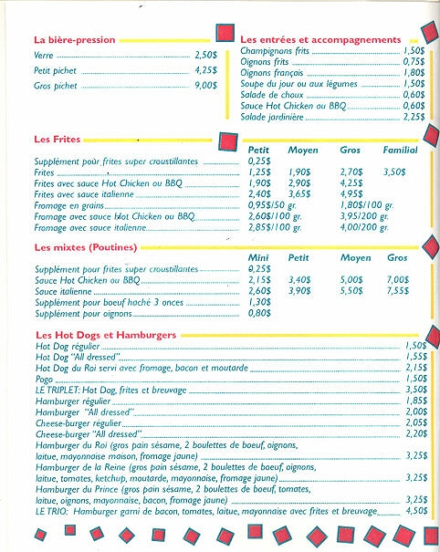 Français cadien: Page extraite du menu du Royaume de la Patate de Plessisville publié en 1995. Même après tant d'années où le nom Poutine circulait au Québec, le nom Mixte était toujours en usage en ajoutant "poutine" pour que les touristes s'y retrouve.